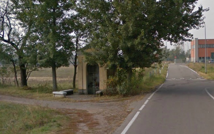 Cappella della Madonnina a Corbetta (MI) - Italia